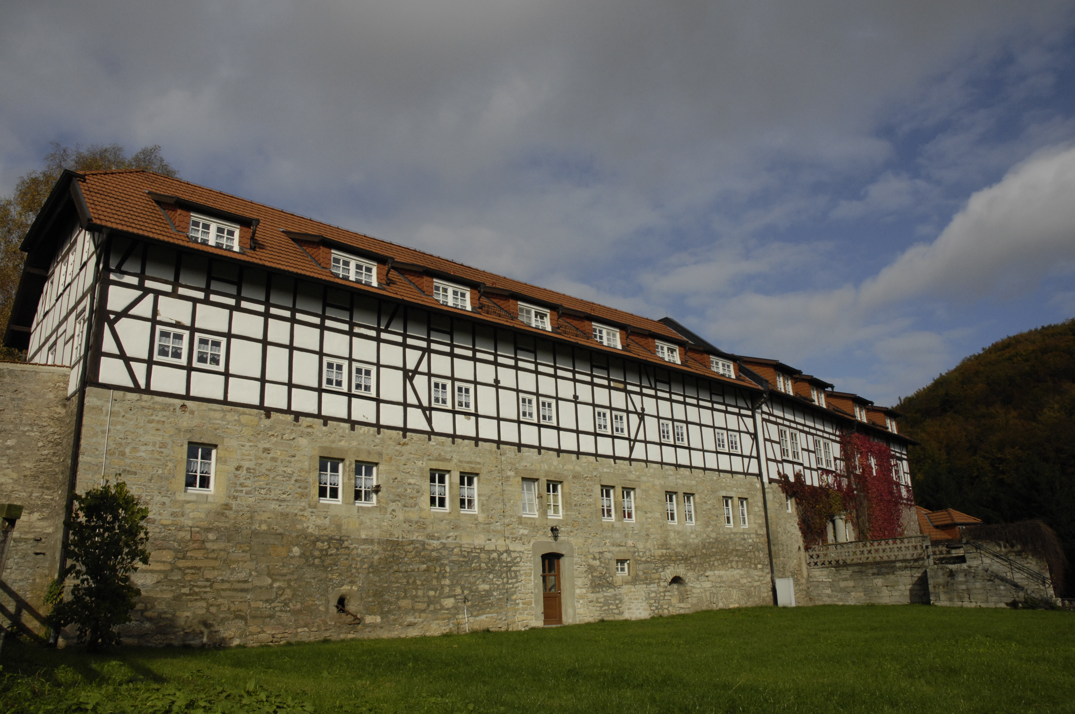 Kloster Zella im südlichen Eichsfeld, Außenfassade